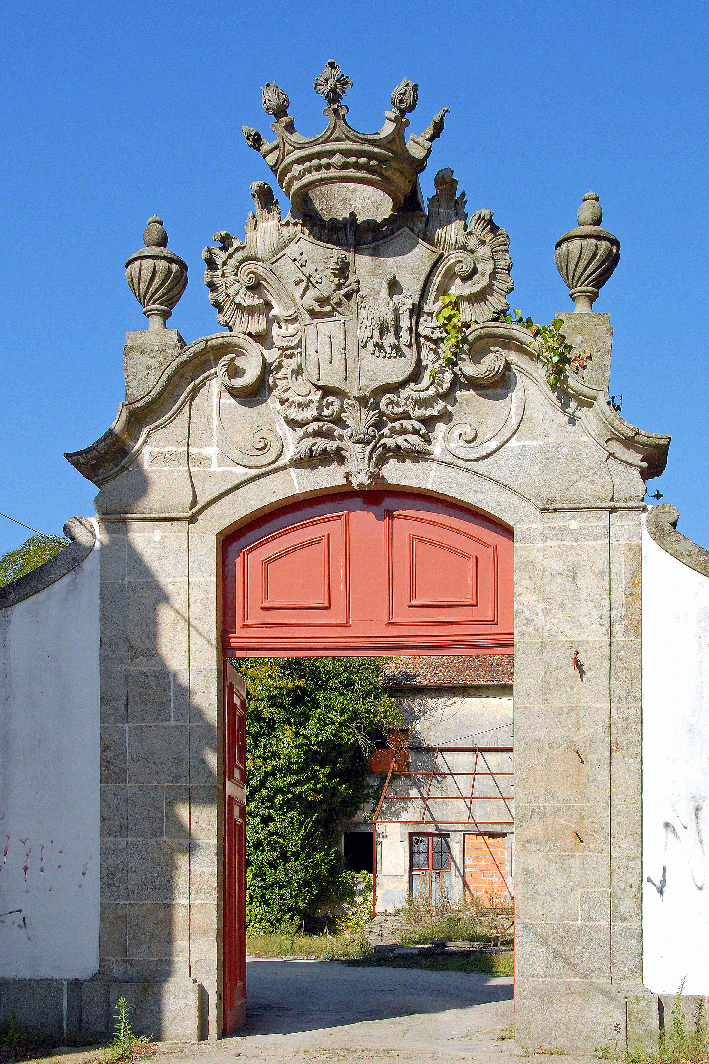 Quinta e Casa da Revolta - hoje inseridos no Horto do Freixo